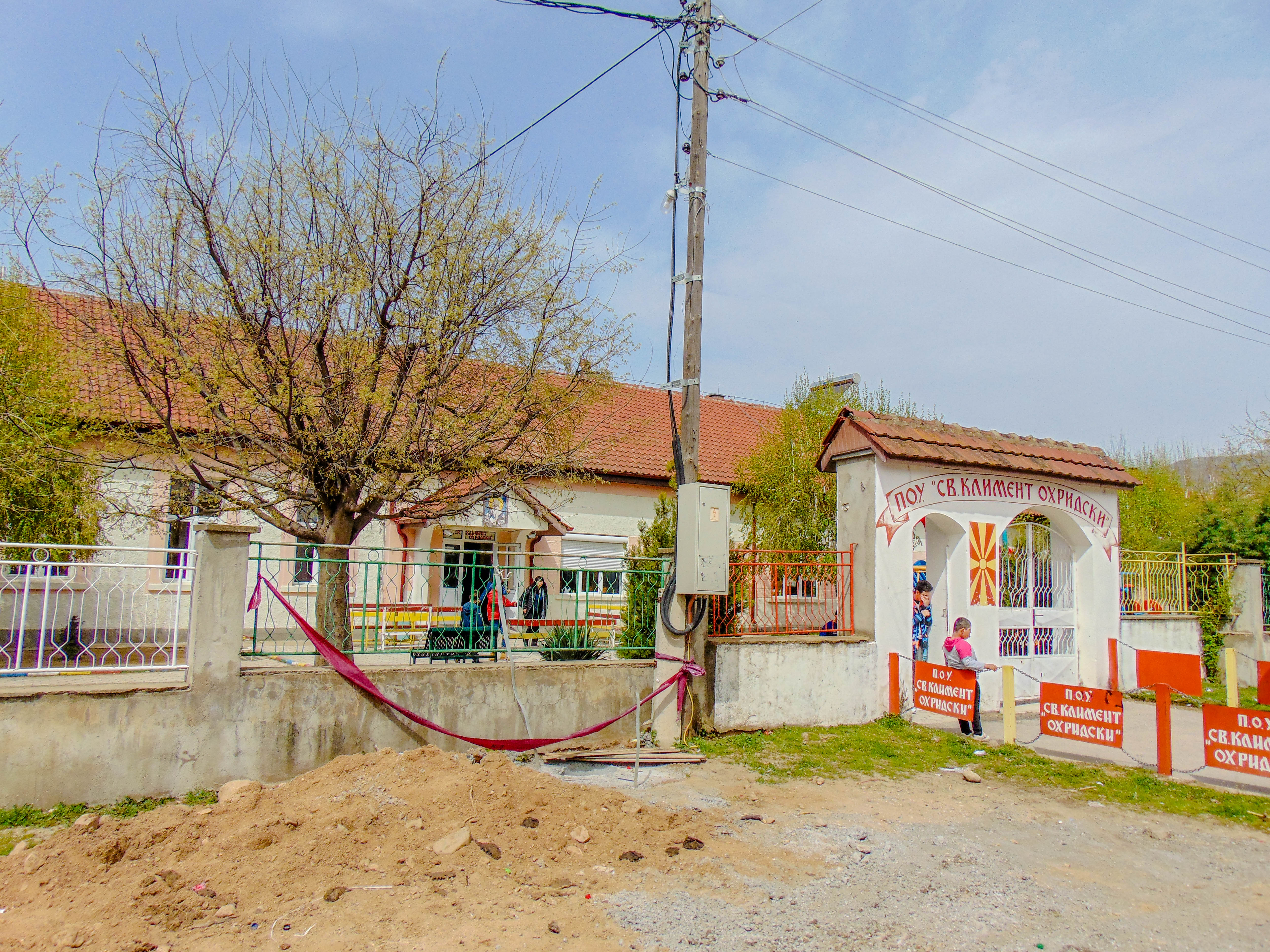 ПОУ „Св. Климент Охридски“ - Ново Село